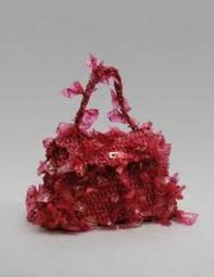 Sacs plastique tressés